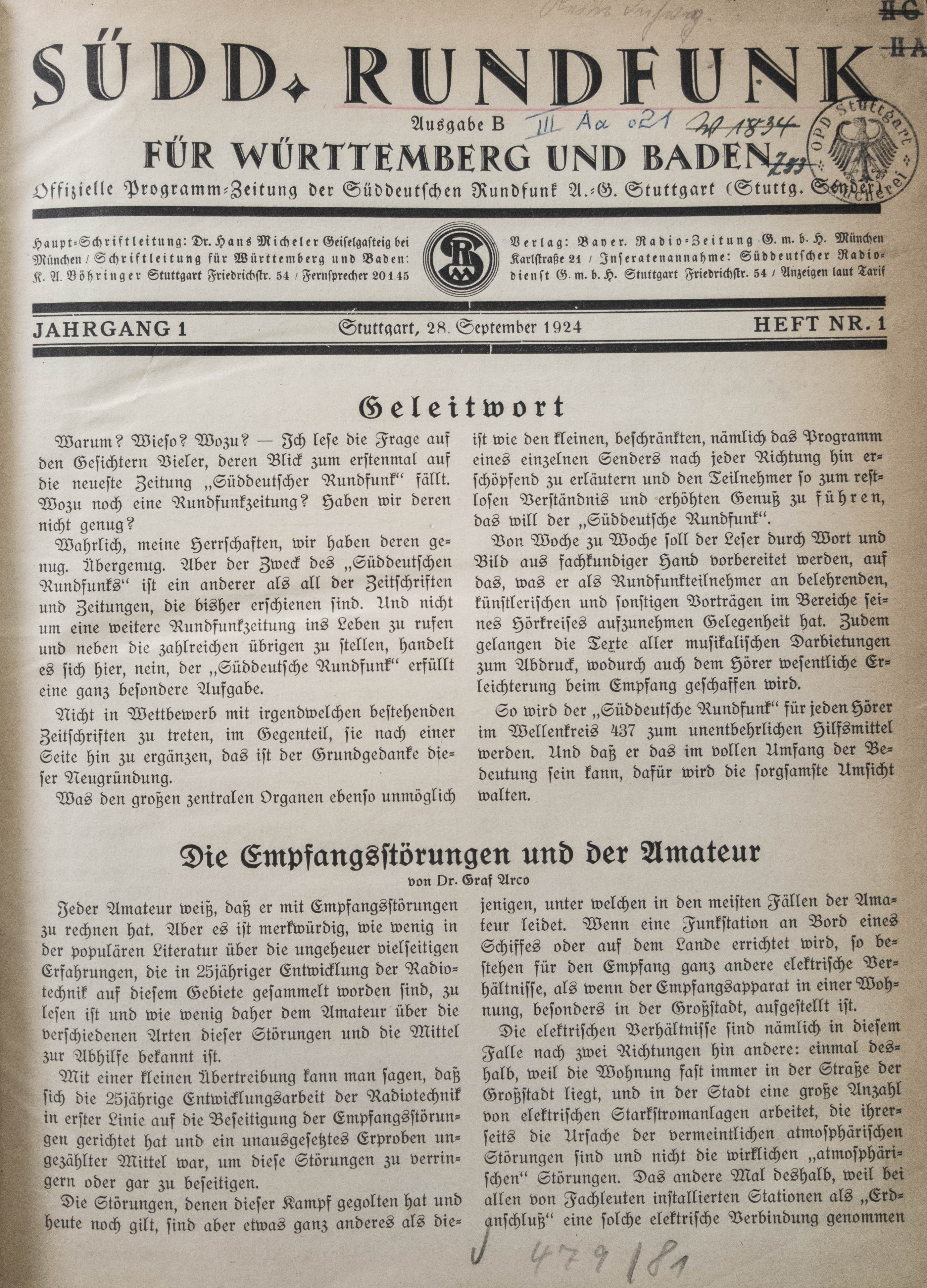 Deckblatt der ersten Ausgabe der Programmzeitschrift "Südd. Rundfunk". Gefunden und gescannt im Museum für Kommunikation, Depot Heusenstamm von Maximilian Schönherr, unterstützt von Lioba Nägele.